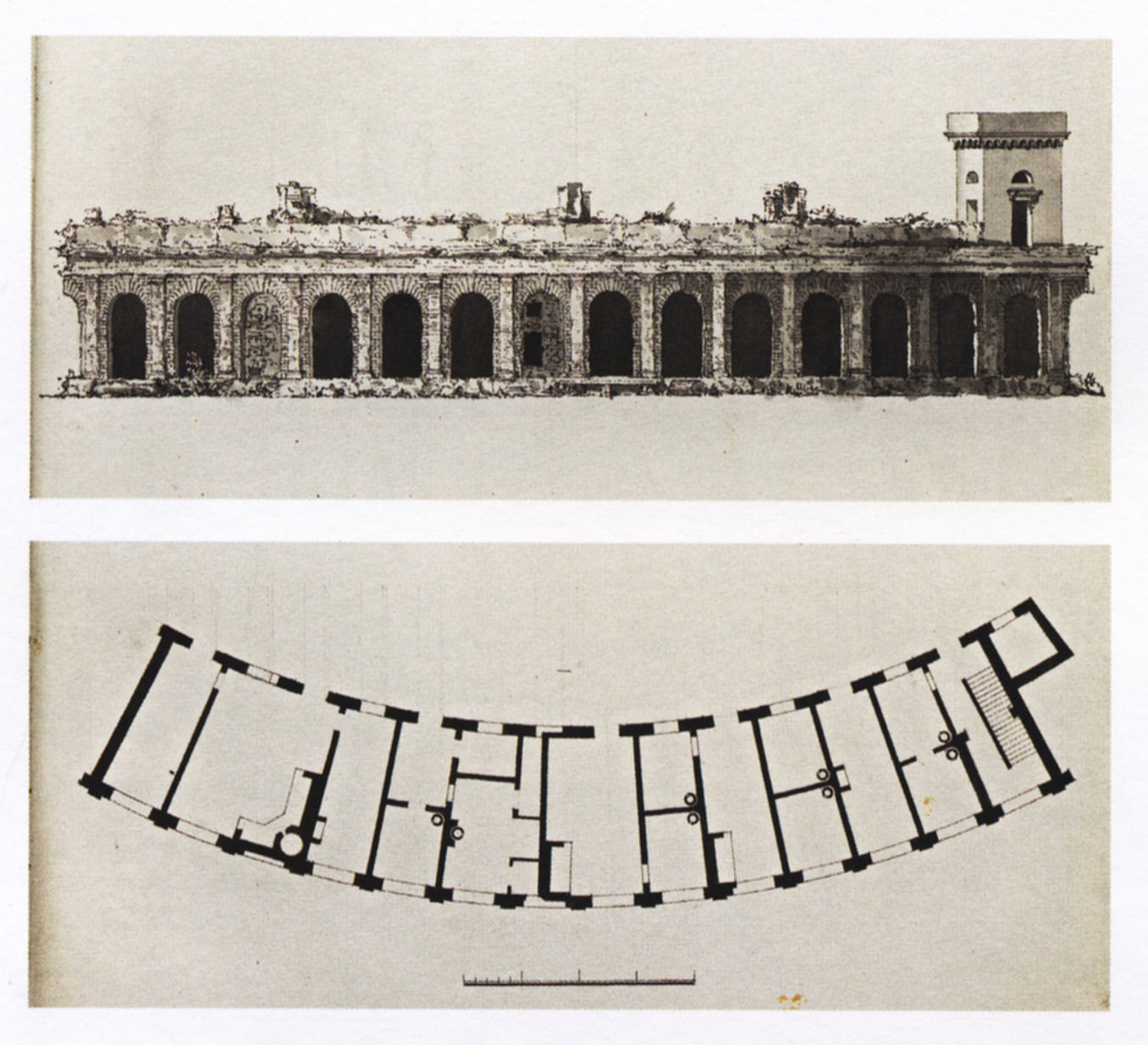 Förslag till en ekonomibyggnad i ruindesign i Hagaparken